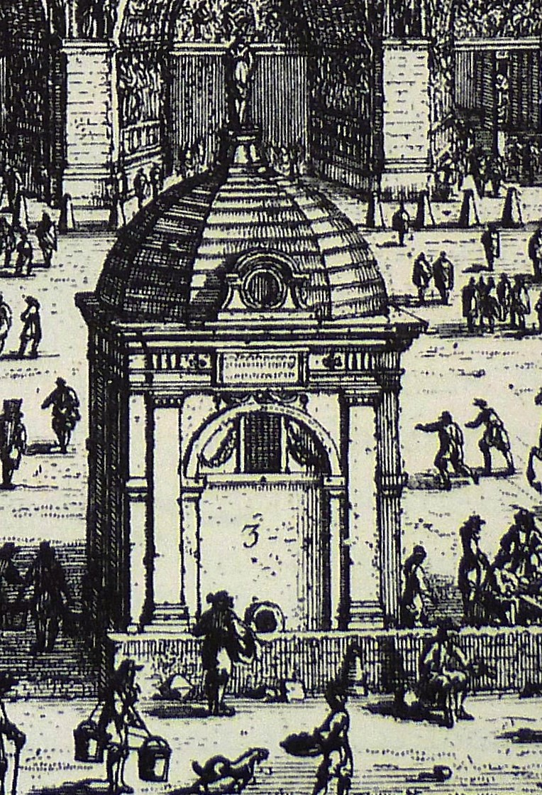 La fontaine du Parvis Notre-Dame, sur le parvis de ND de Paris, île de la Cité. Elle est détruite en 1748. Détail d'une gravure, Bibliothèque Nationale, Cabinet des Estampes n° VA 419.